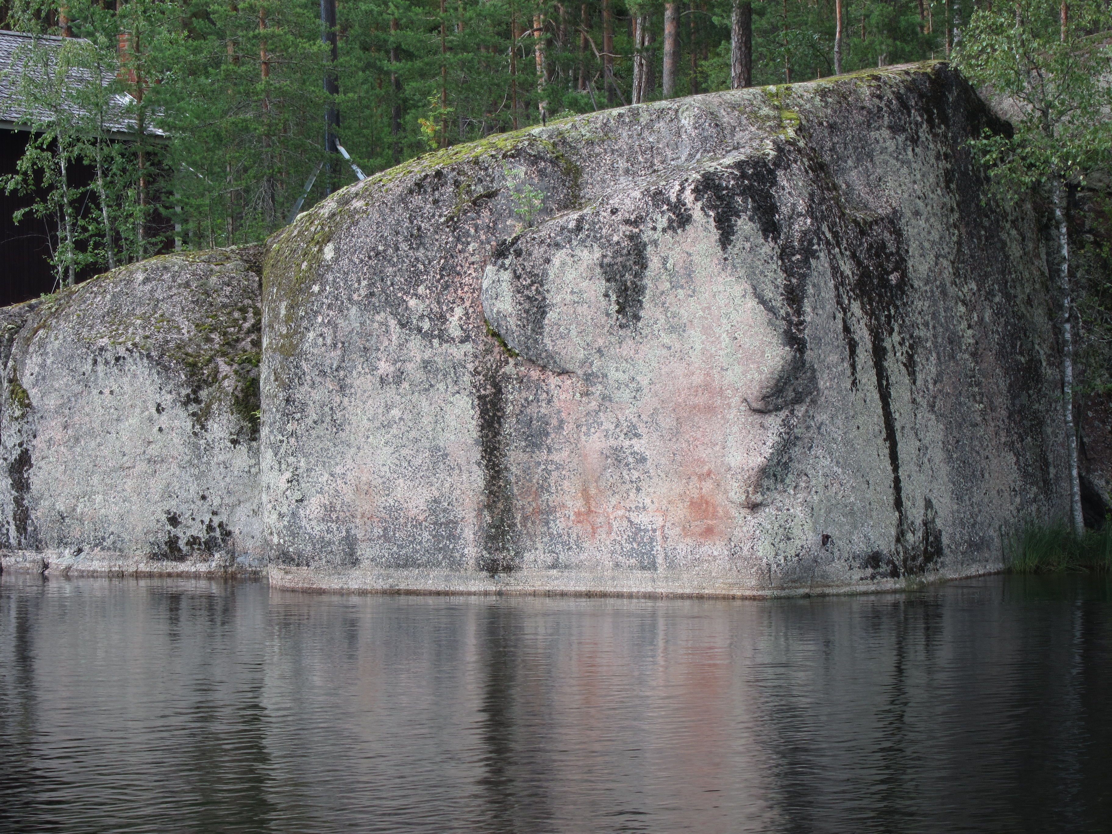 Verlan kalliomaalaus Kouvolassa.